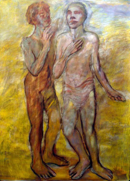 Narcissus